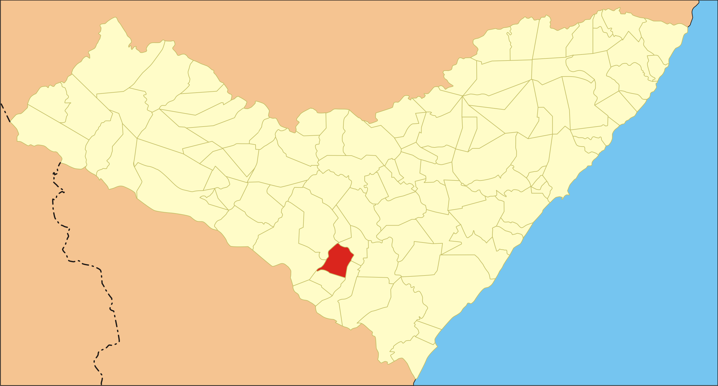 Localização da cidade em Alagoas